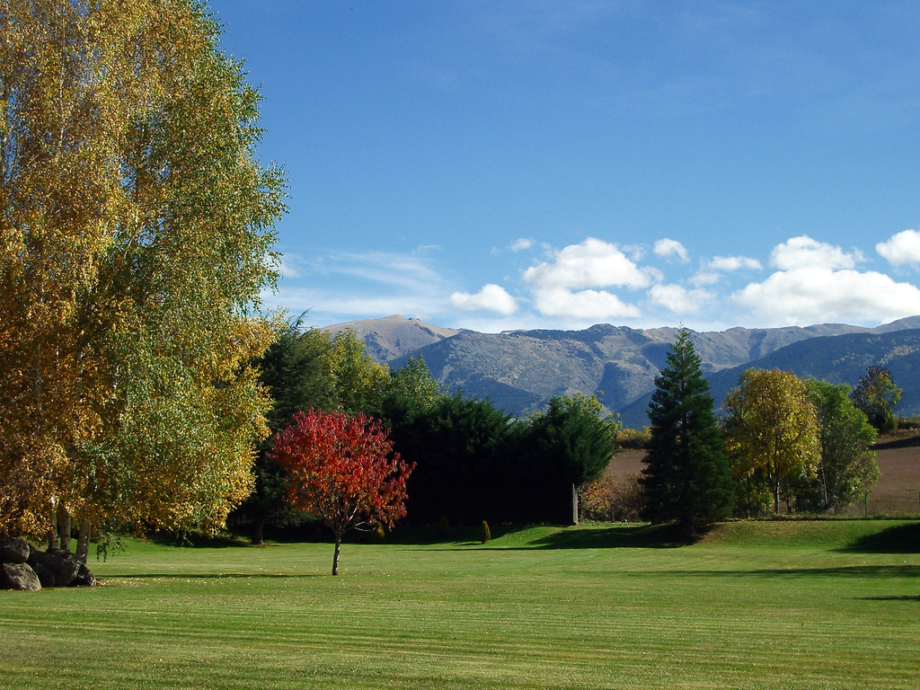 Foto preciosa de Llívia, Catalunya.